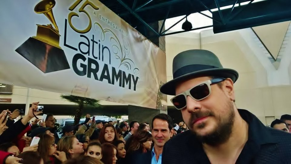 Max Masri en los Grammy Latinos 2014